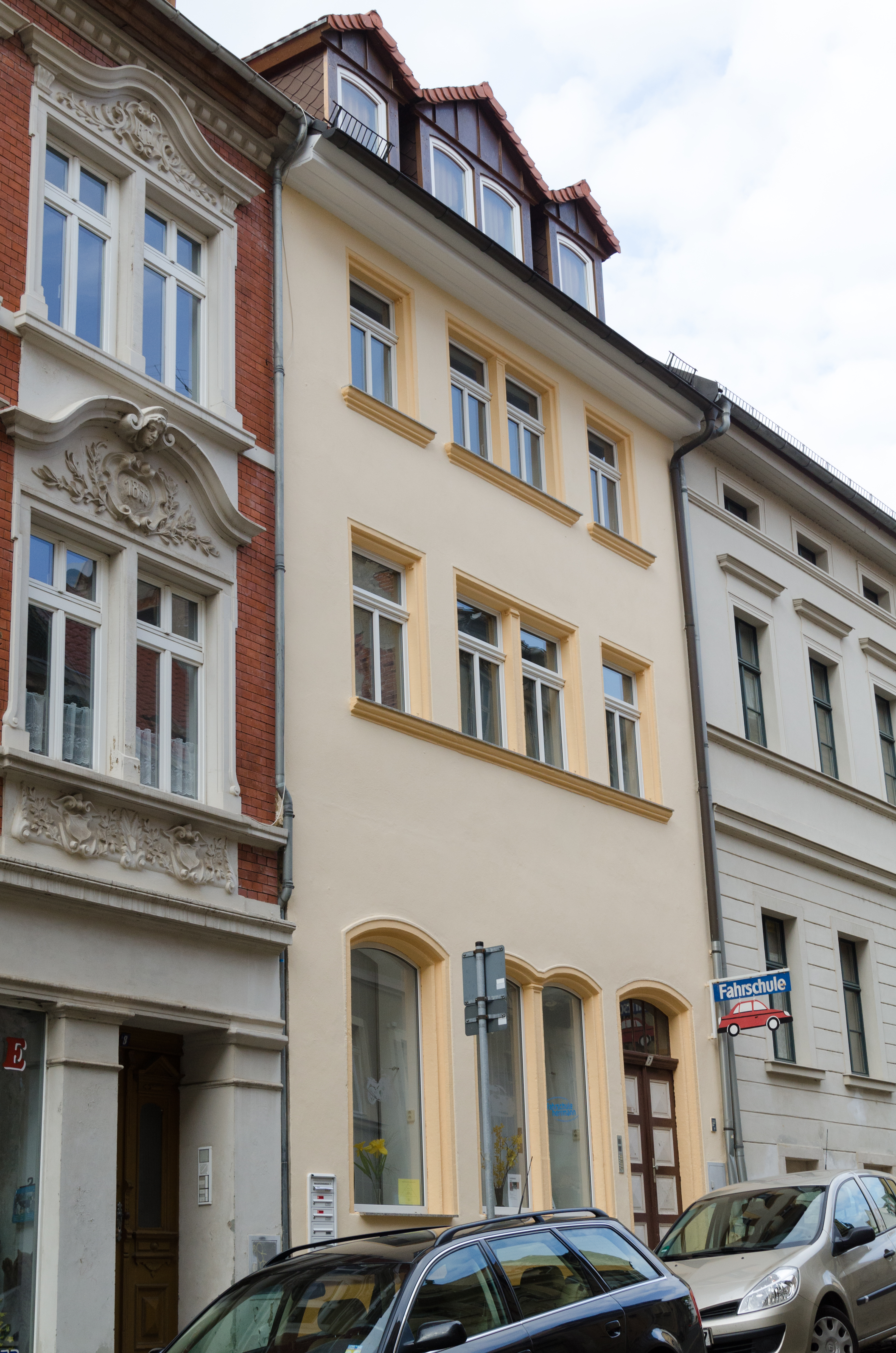 Zeitz, Messerschmiedestraße 7